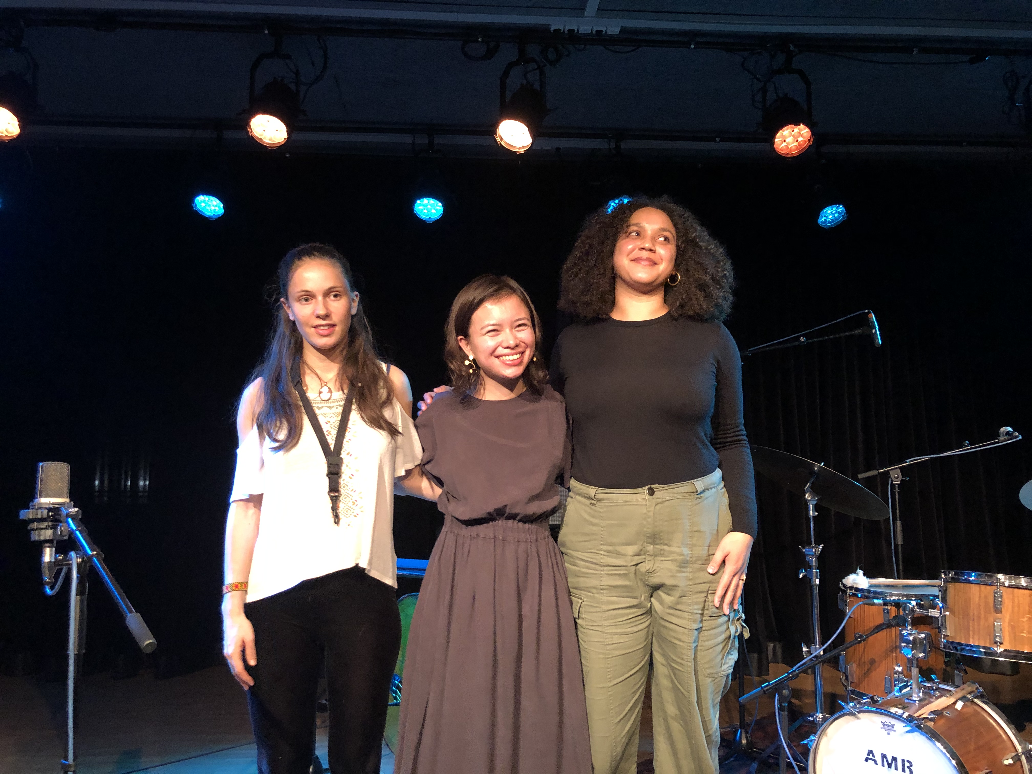 Maria Grand, Kanoe Mendenhall et Savannah Harris à l’AMR 8.11.2019